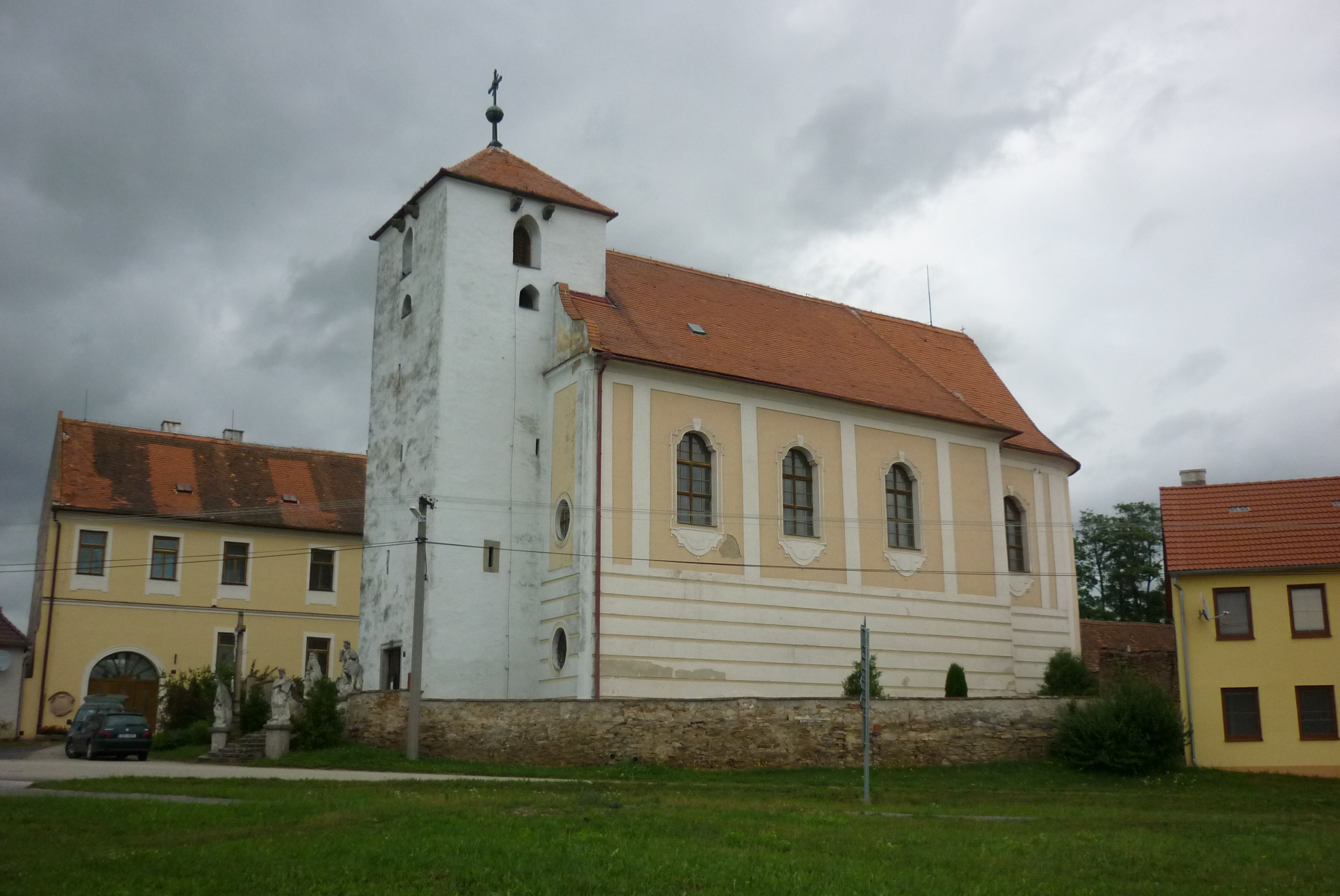 Farní kostel Nanebevzetí Panny Marie v Rancířově